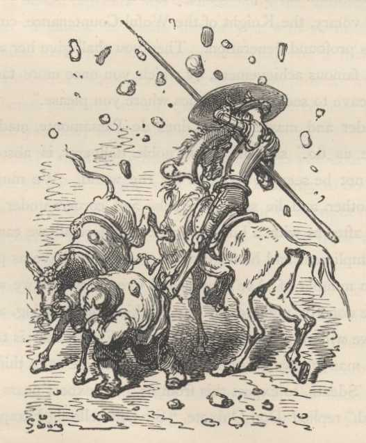 Dom Quixote e Sancho Pança são apedrejados